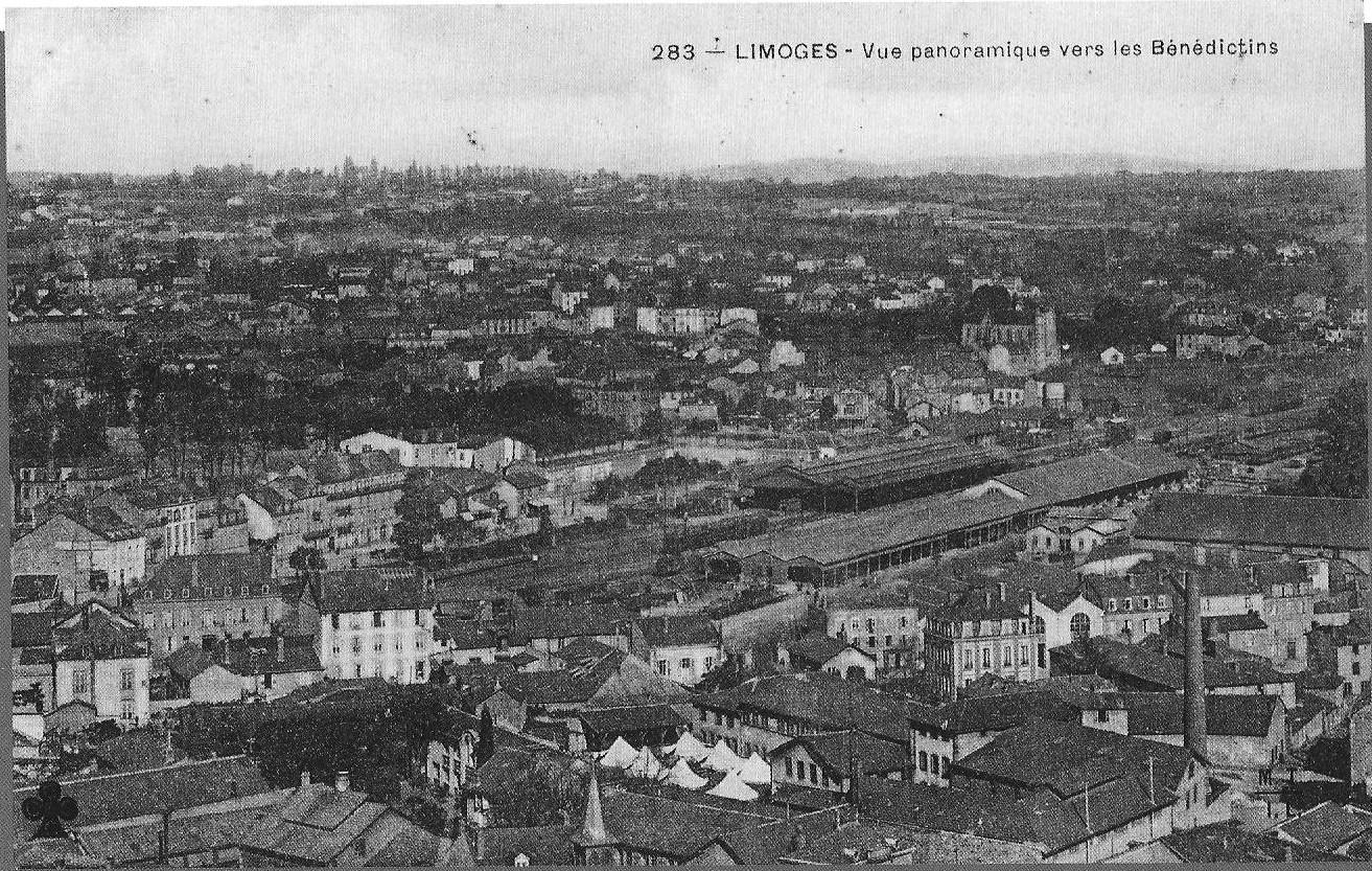 Vue de Limoges et du quartier de la gare